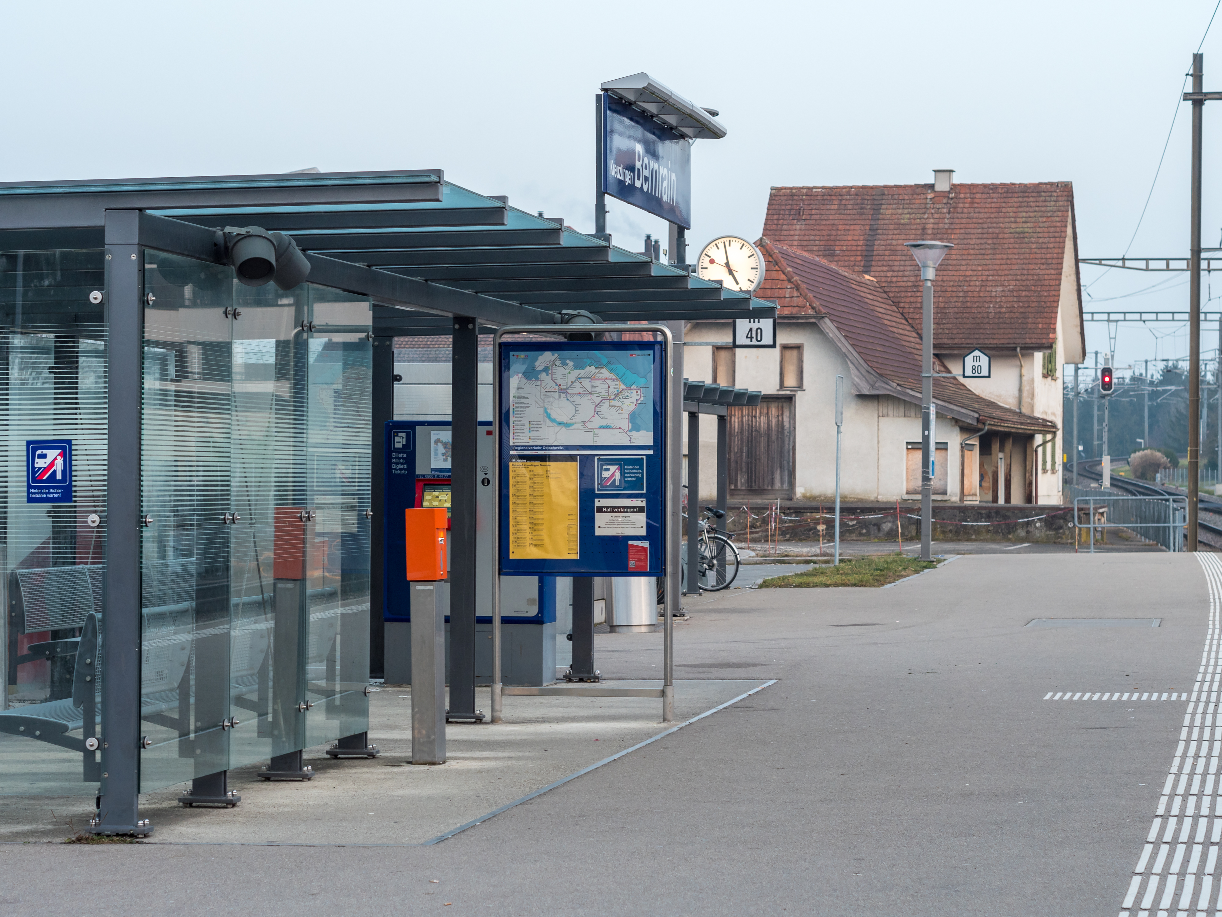 Bahnhof Kreuzlingen-Bernrain mit dem ehemaligen Bahnhofsgebäude im Hintergrund